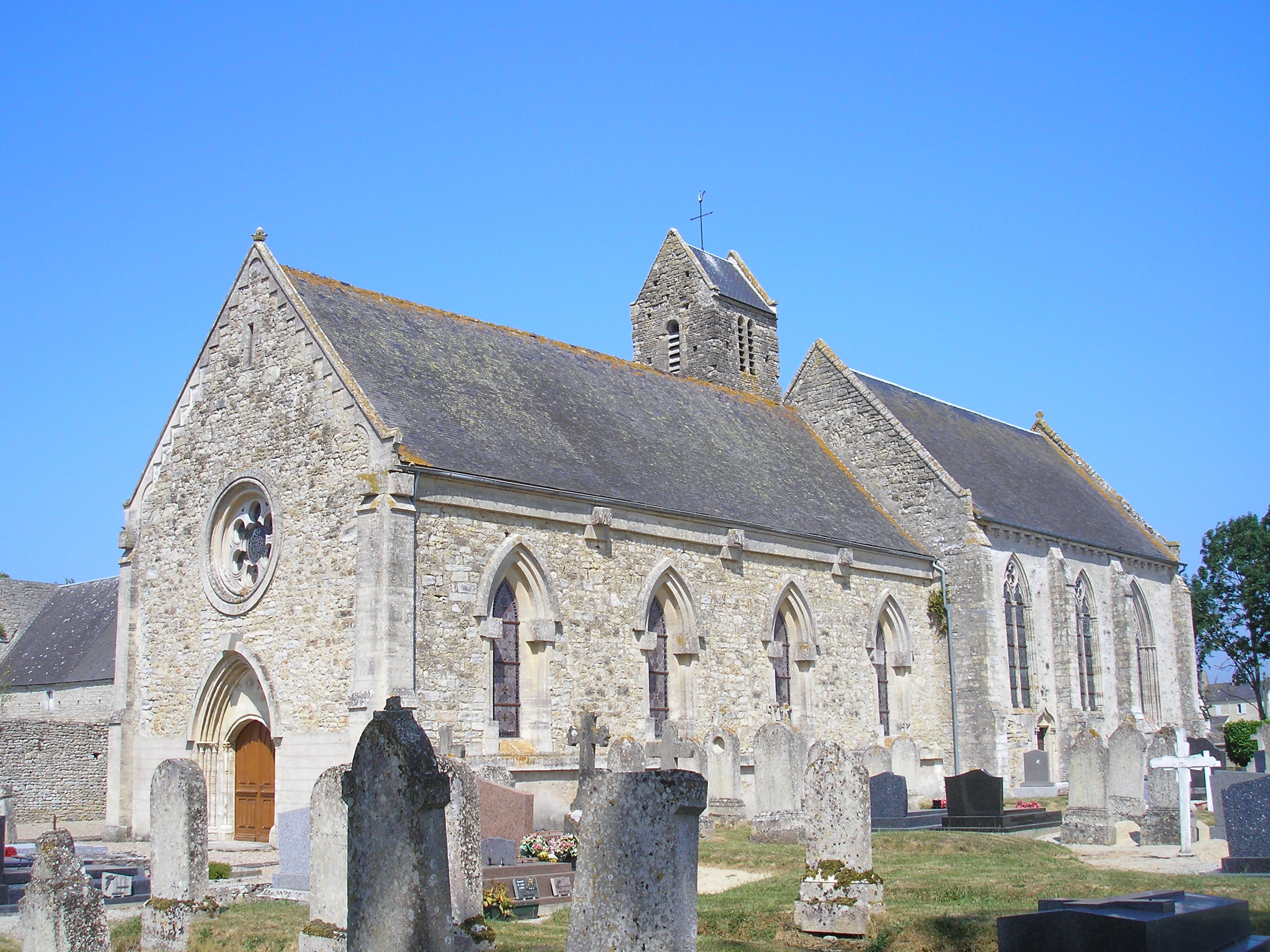 Canchy (Normandie, France). L'église Notre-Dame.